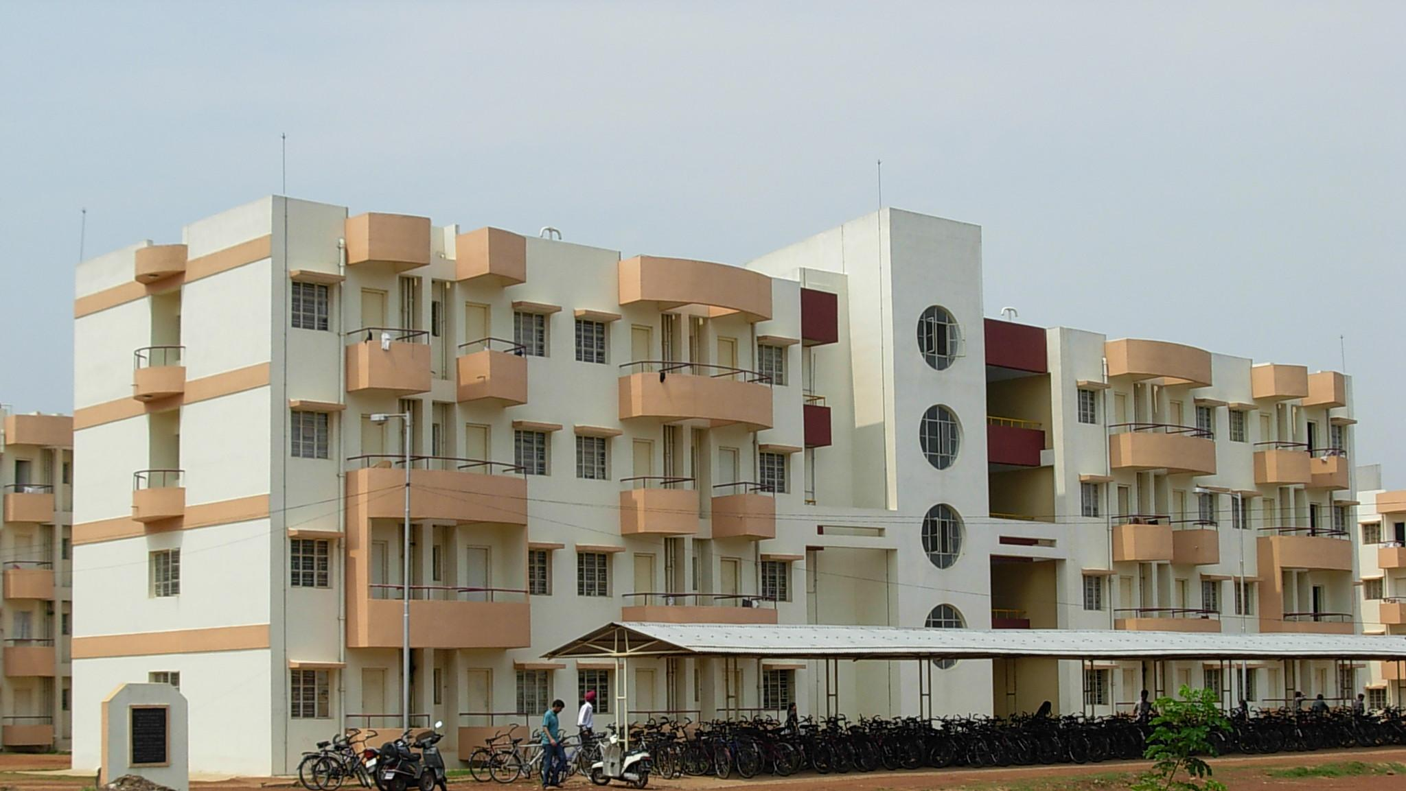 Madan Mohan Malviya Hall in IIT Kharagpur